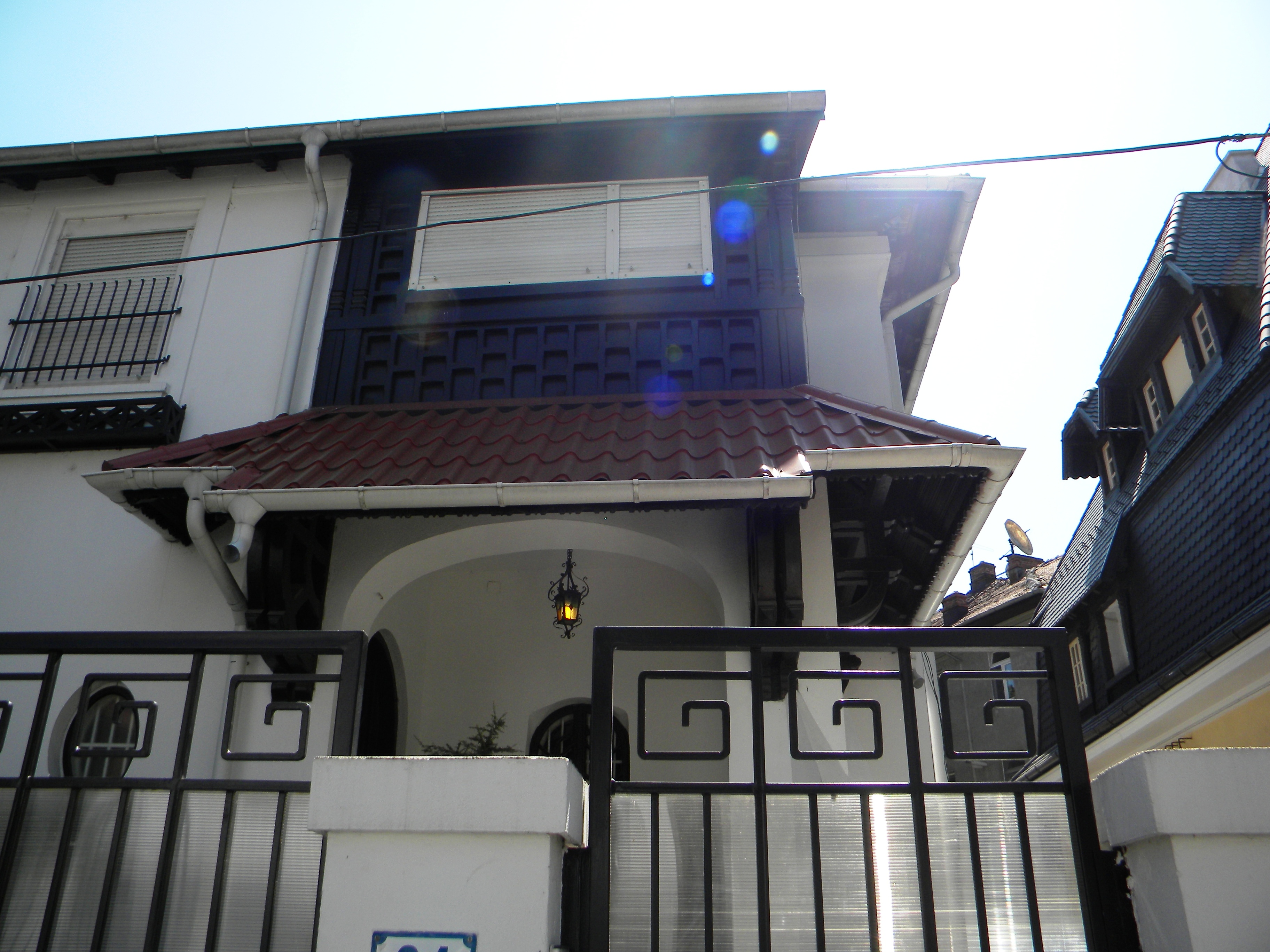 Vila pe Strada Sofia nr. 24, Bucuresti sect. 1 (detaliu)